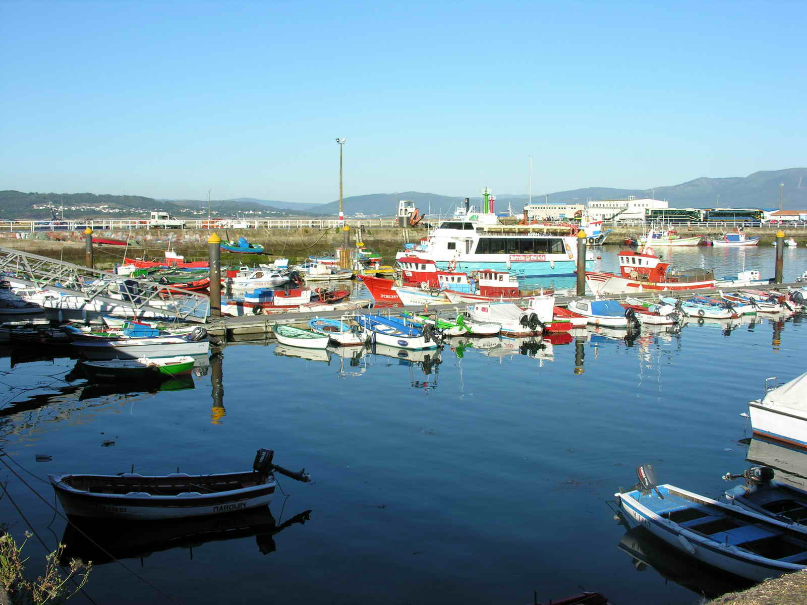 Porto de Muros (A Coruña). Foto tirada cunha Nikon E8800. Self made